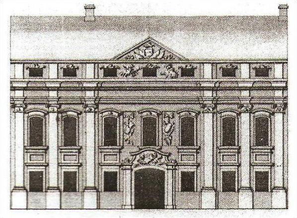 Беларуская (тарашкевіца): Вільня (Vilnia), вуліца Сьвятаянская (vulica Śviatajanskaja). палац Пацаў (Pac)